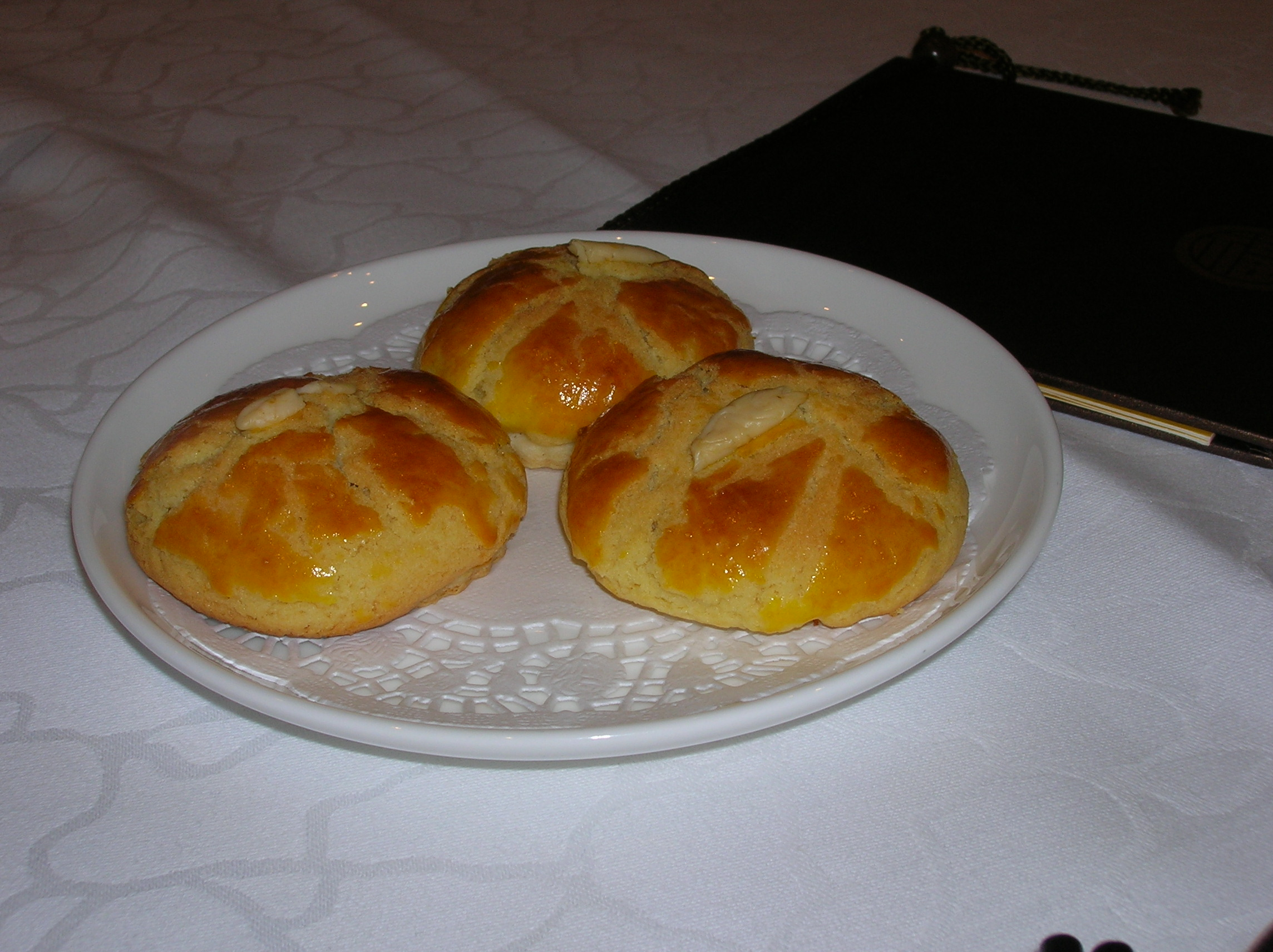 מתאבנים במסעדת פוק לאם מון